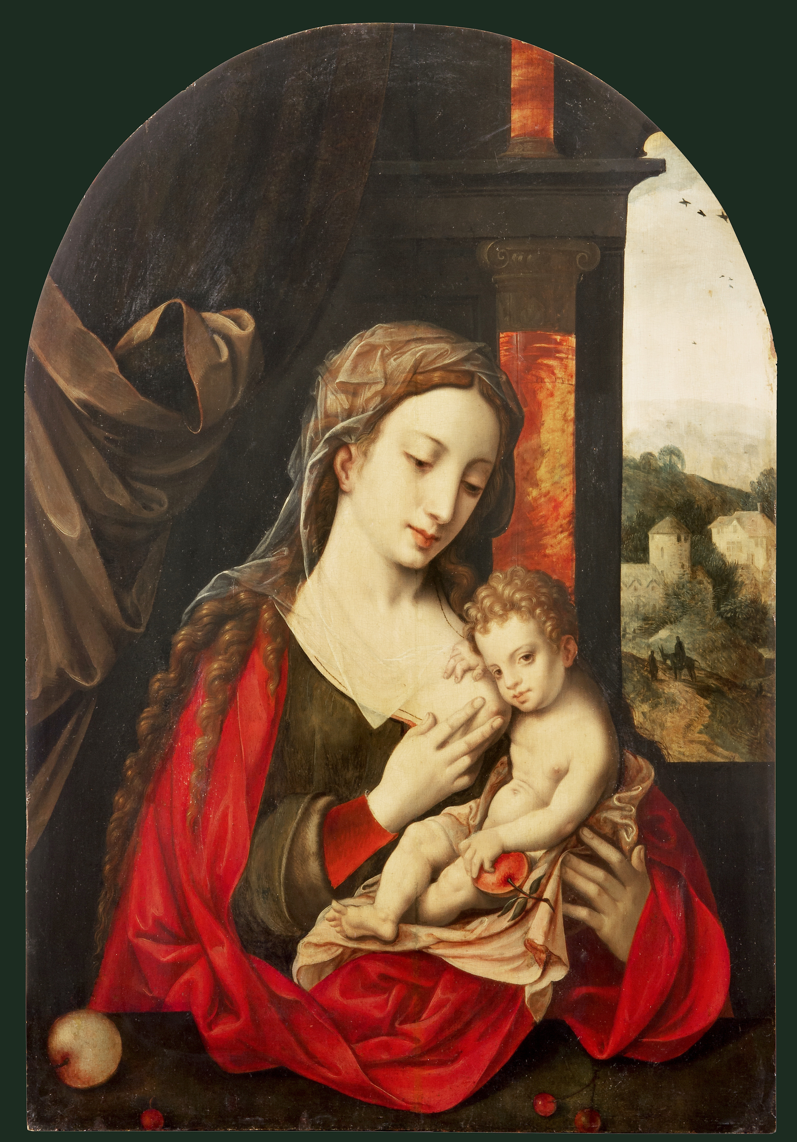 Madonna con Bambino olio su tavola centinata, cm. 79 x 53.5 Collezione privata